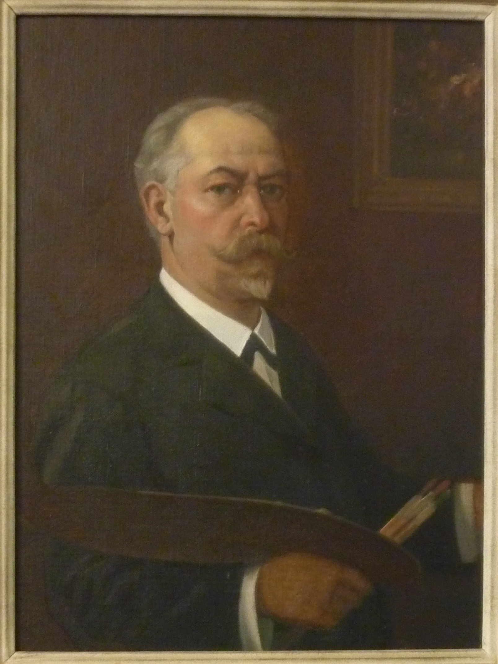 Marius Beul Selbstportrait, nach 1900